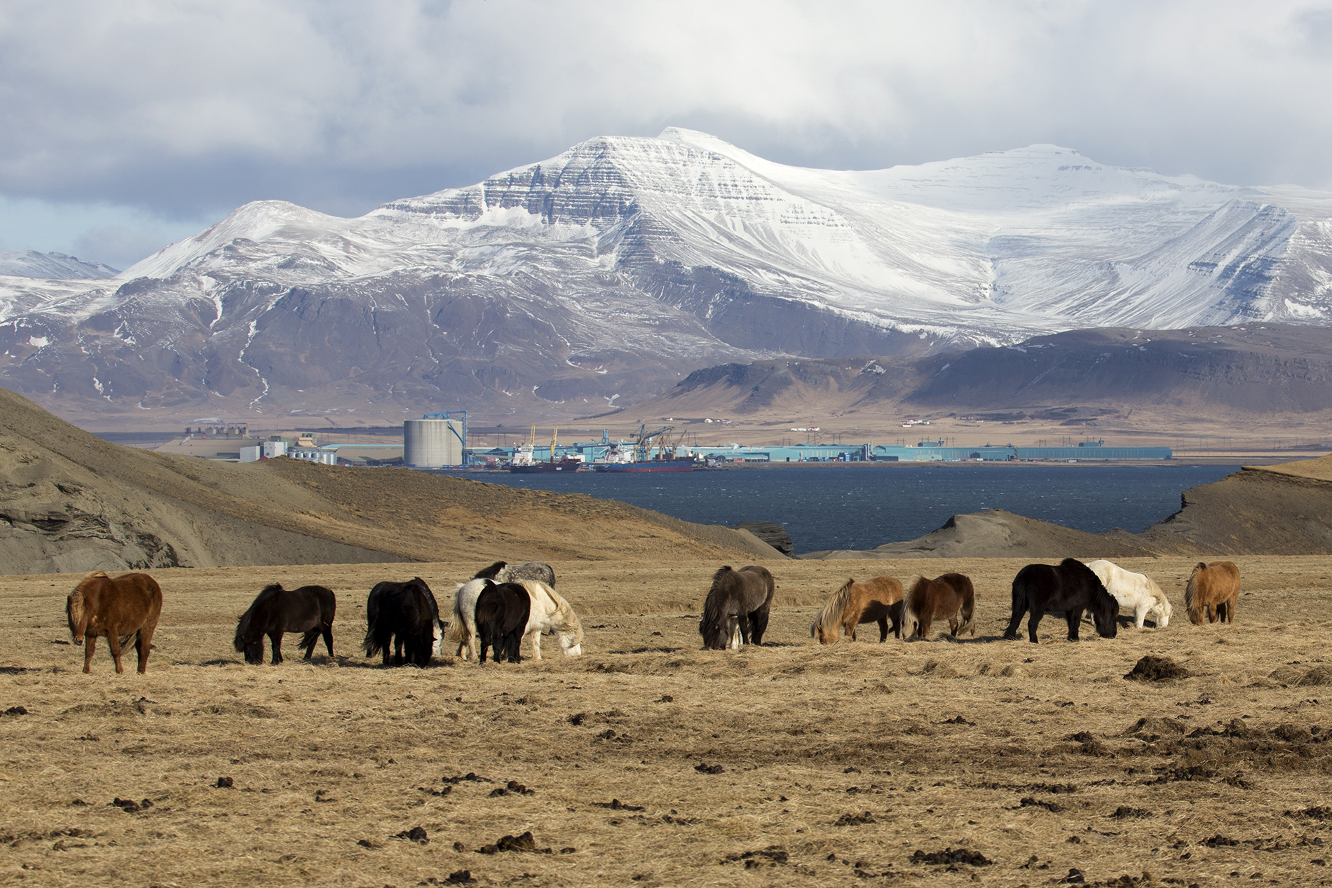 UK5A4298